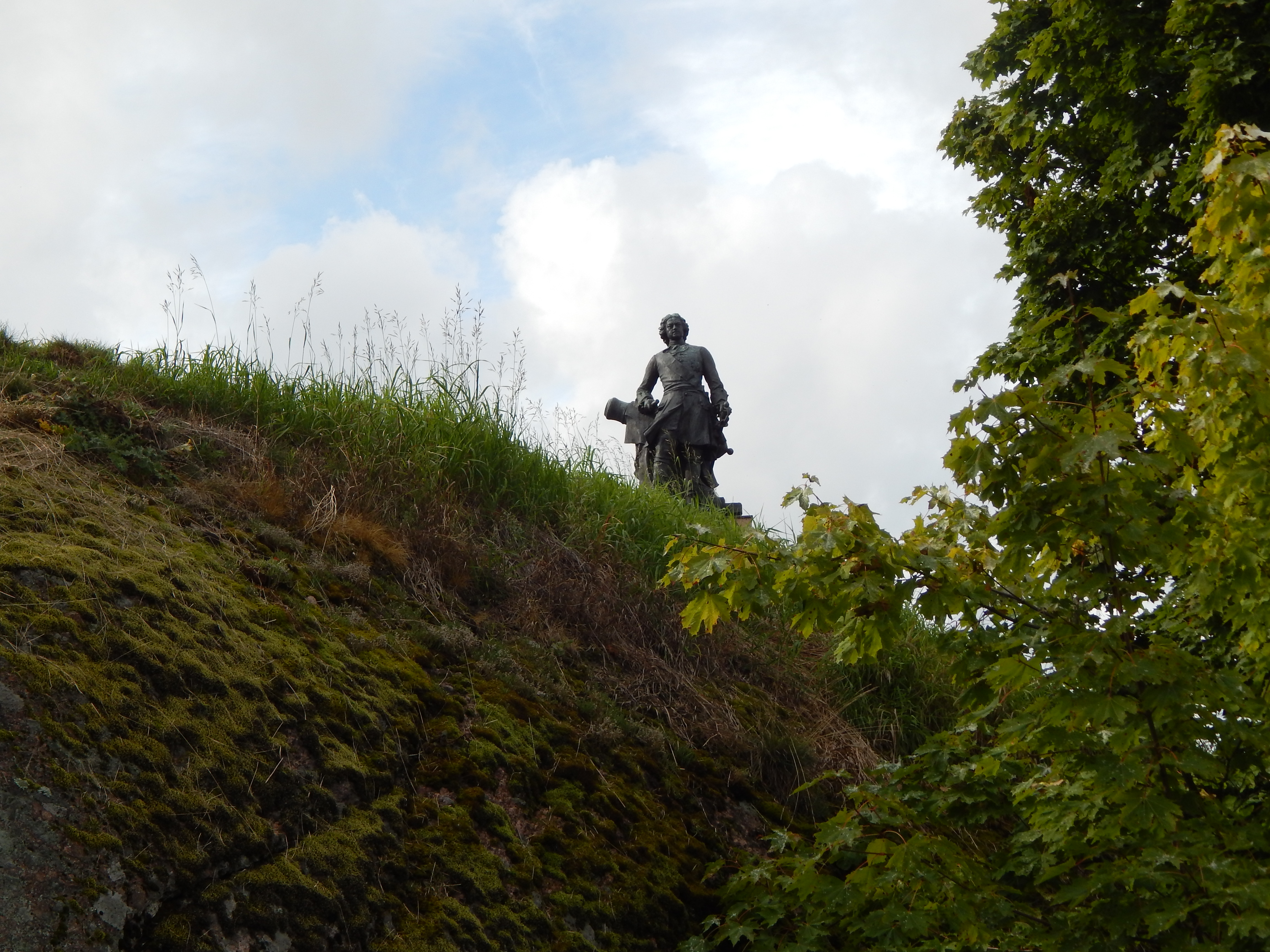 Памятник императору Петру I: Петровская гора, близ здания облархива, Выборг, Выборгский район, Ленинградская область